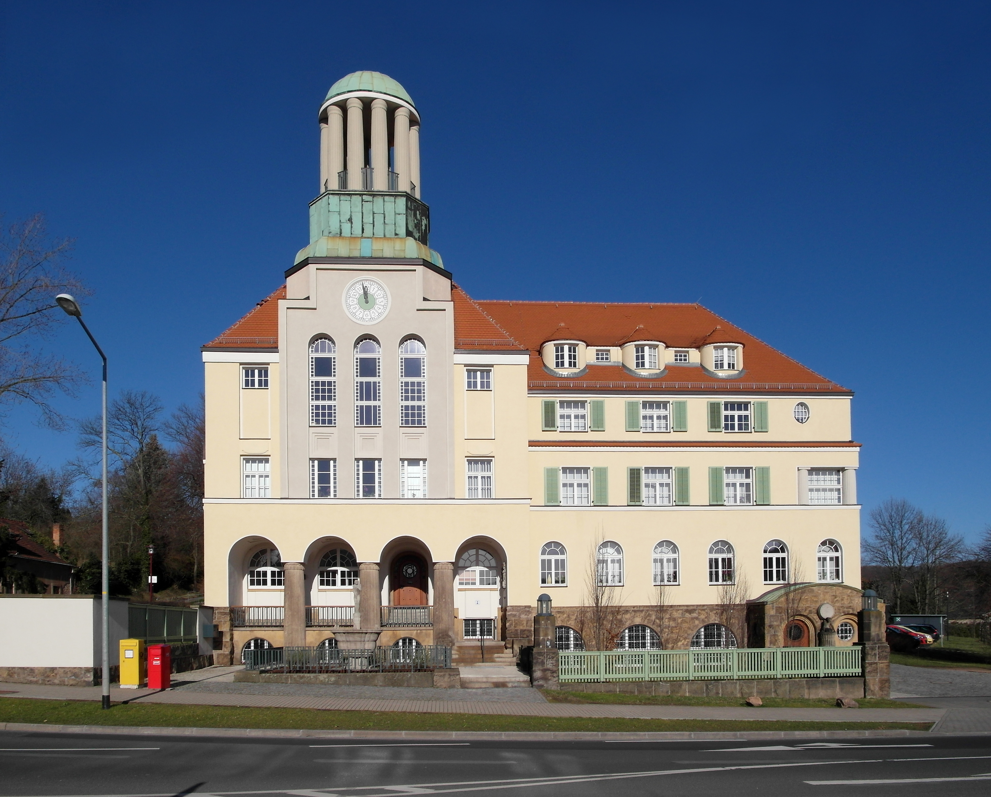 02.02.2018 01705 Freital-Döhlen, Lutherstraße 22: Historisches Rathaus Döhlen mit Säulentürmchen und grüner Kupferkuppel (GMP: 51.007008,13.650152). Das Gebäude wurde 1914-1915 nach Plänen von Rudolf Bitzan errichtet. Am 01.10.1921 wurde hier die Stadt Freital gegründet. Später verschiedenen Nutzungen, u.a. als Landratsamt. Ab 2012 Sitz der Städtischen Wohnungsgesellschaft Freital. [SAM3645.JPG]20180202105DR.JPG(c)Blobelt